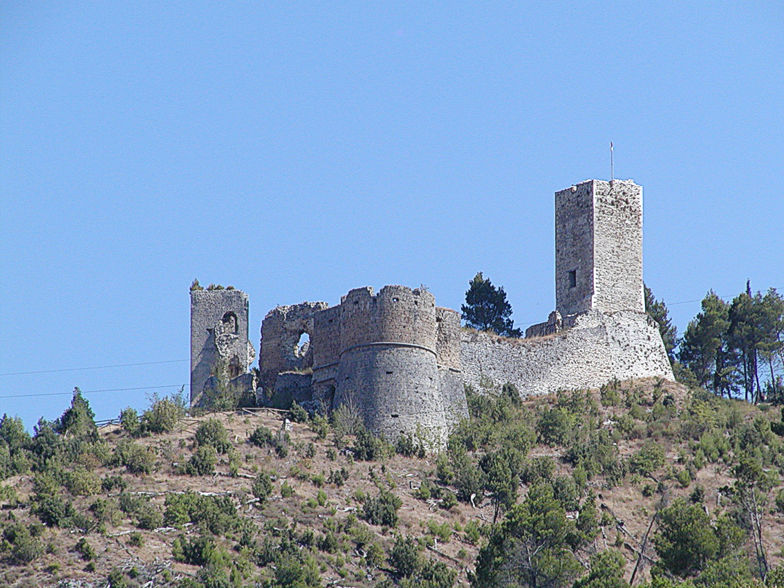 Castello del Duca Cantelmo